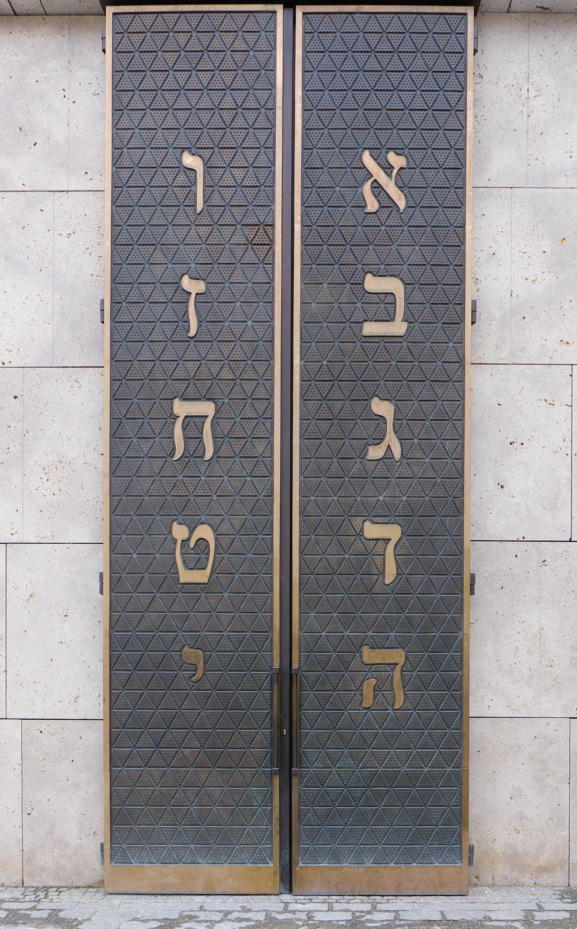 Die ersten zehn hebräischen Buchstaben Aleph bis Jod von oben nach unten und von rechts nach links auf den beiden Türen der Hauptsynagoge Ohel Jakob im Jüdischen Zentrum München.